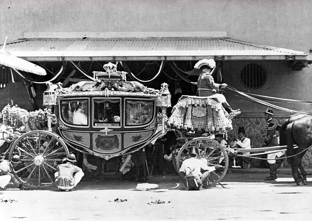 Repronegatief. De soesoehoenan van Soerakarta in zijn gouden koets, Java